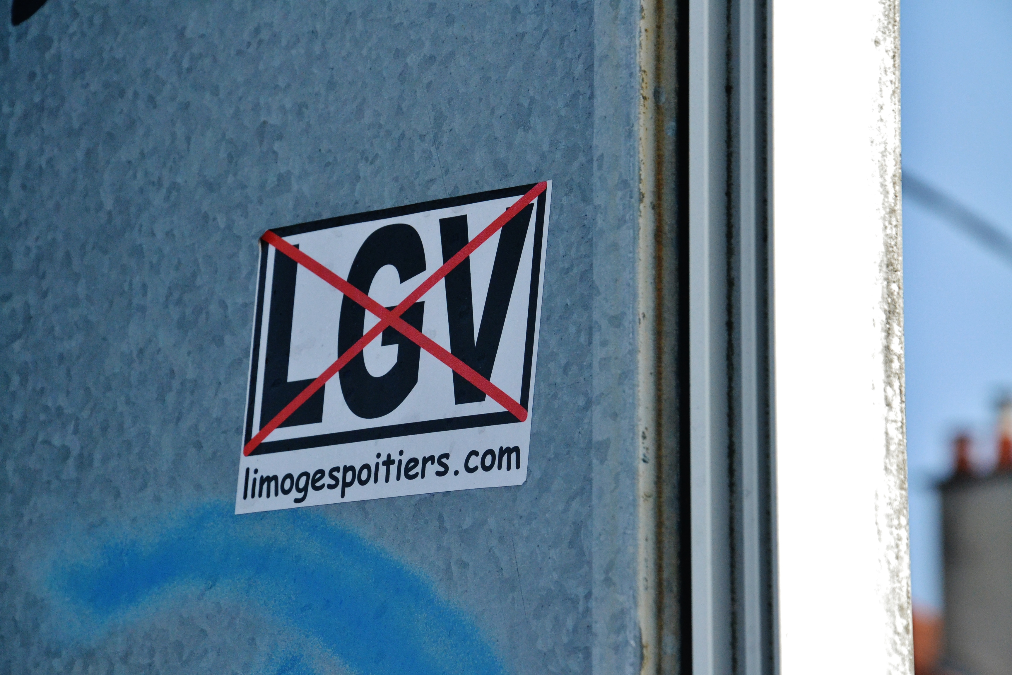 Autocollant hostile à la ligne à grande vitesse Limoges-Poitiers, dans une rue de Limoges, 31 mars 2013